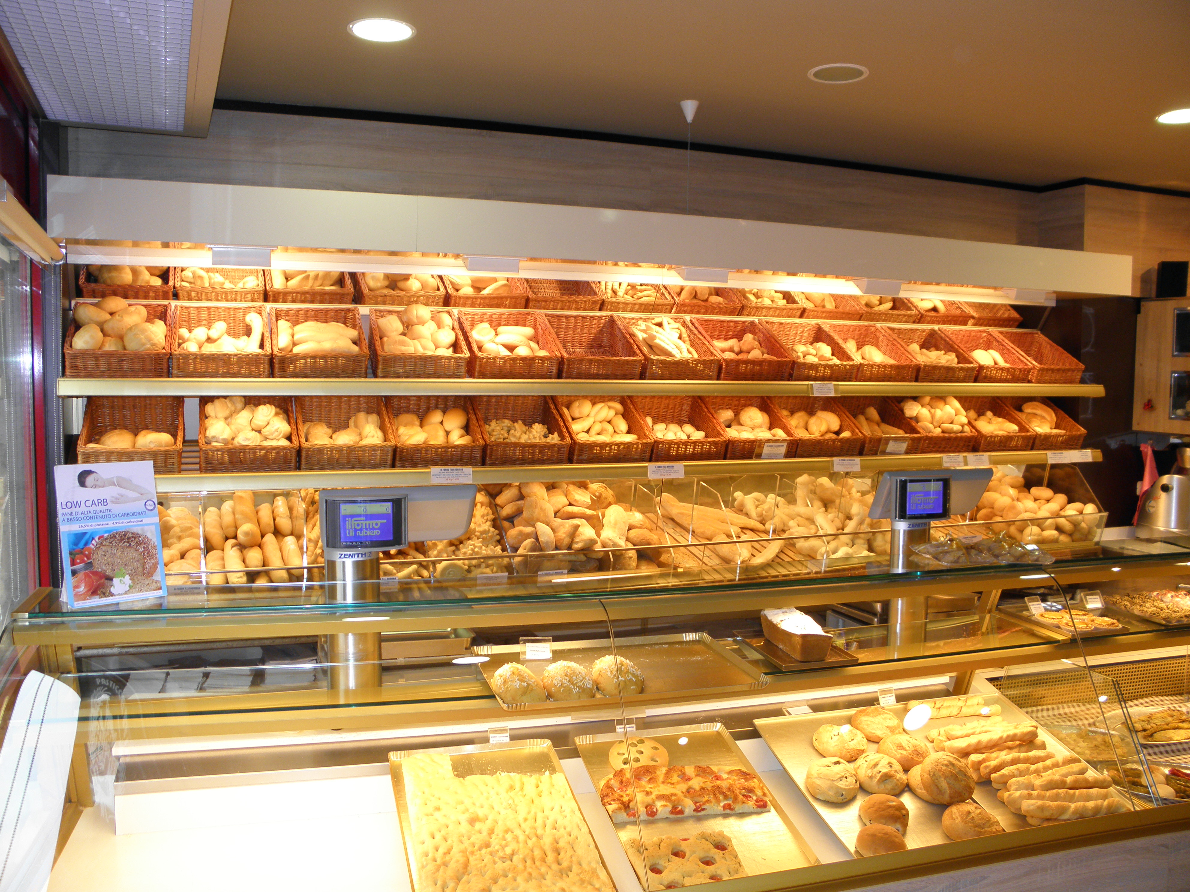 Rovigo, panificio Rubiero 1.